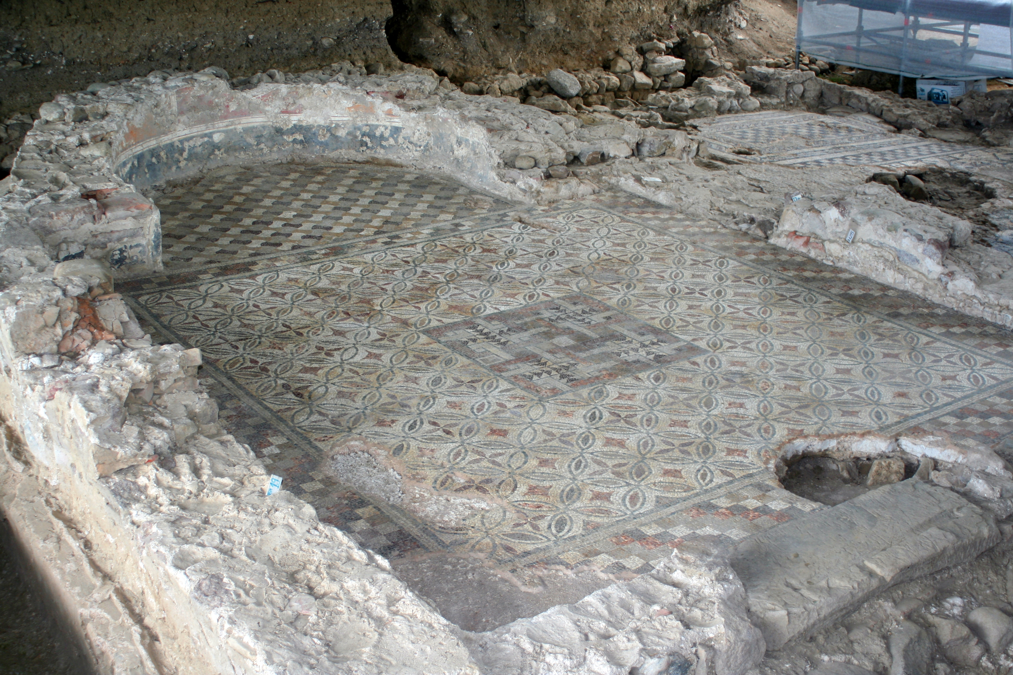 Fundament der römerzeitlichen Villa in St. Pauls